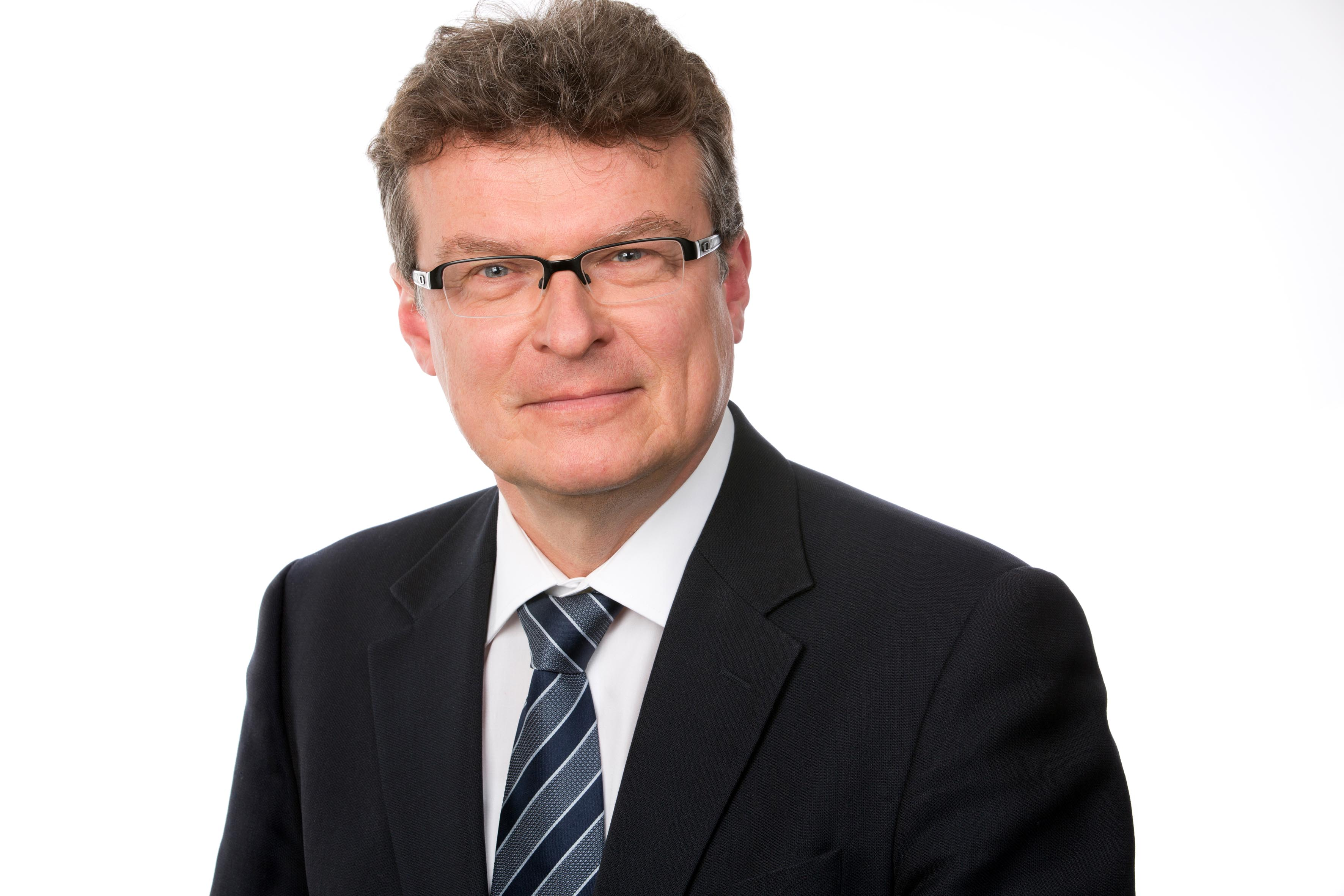 Prof. Dr. theol. Paul-Gerhard Klumbies